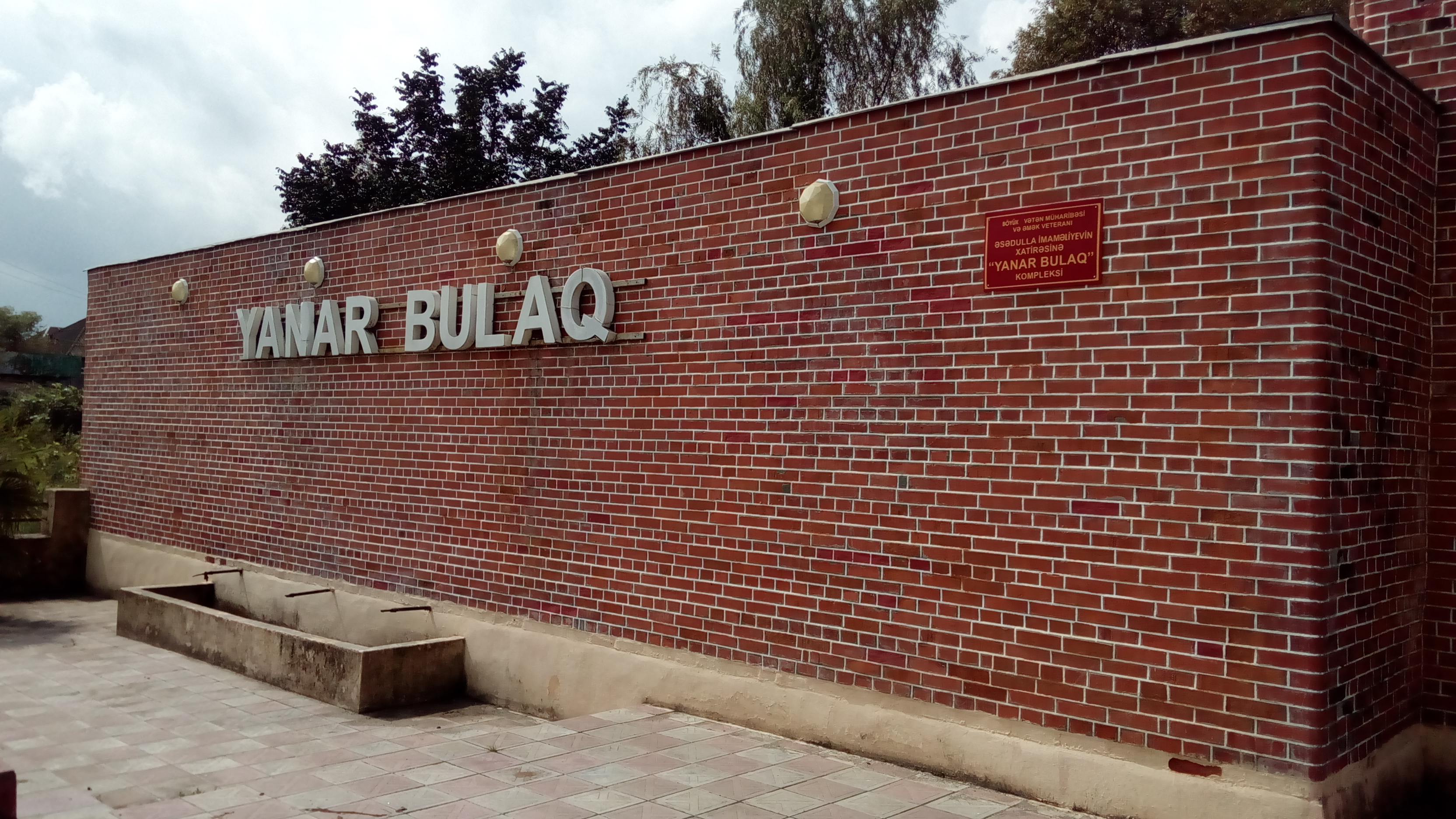 Ərçivan